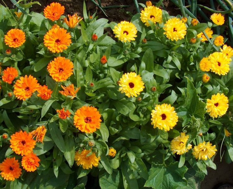 Ringelblumen (Calendula officinalis) in orange und gelb